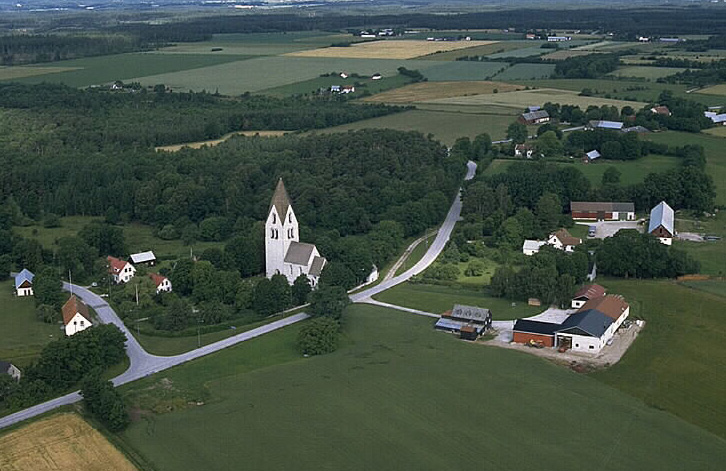 Mästerby